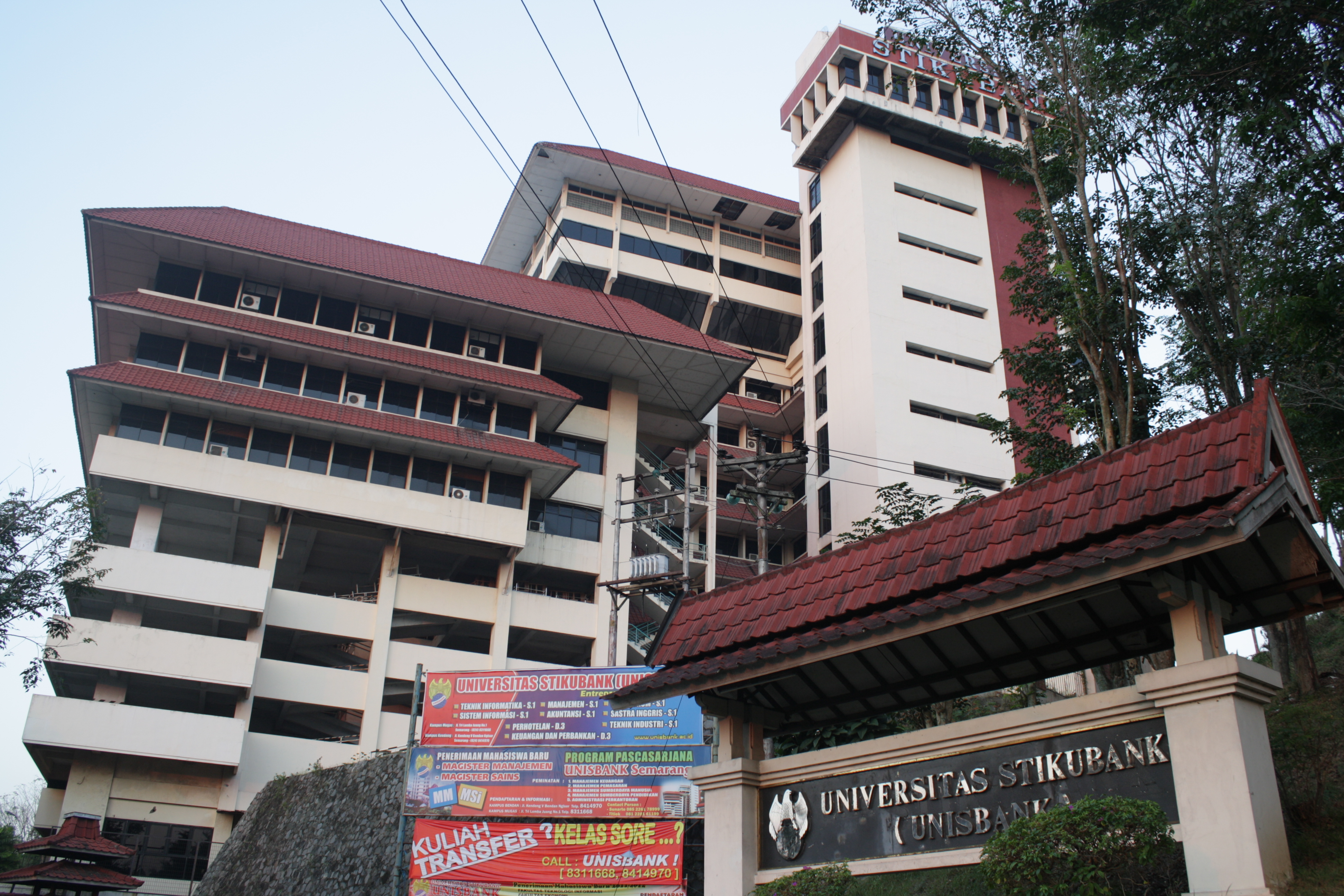 Stikubank